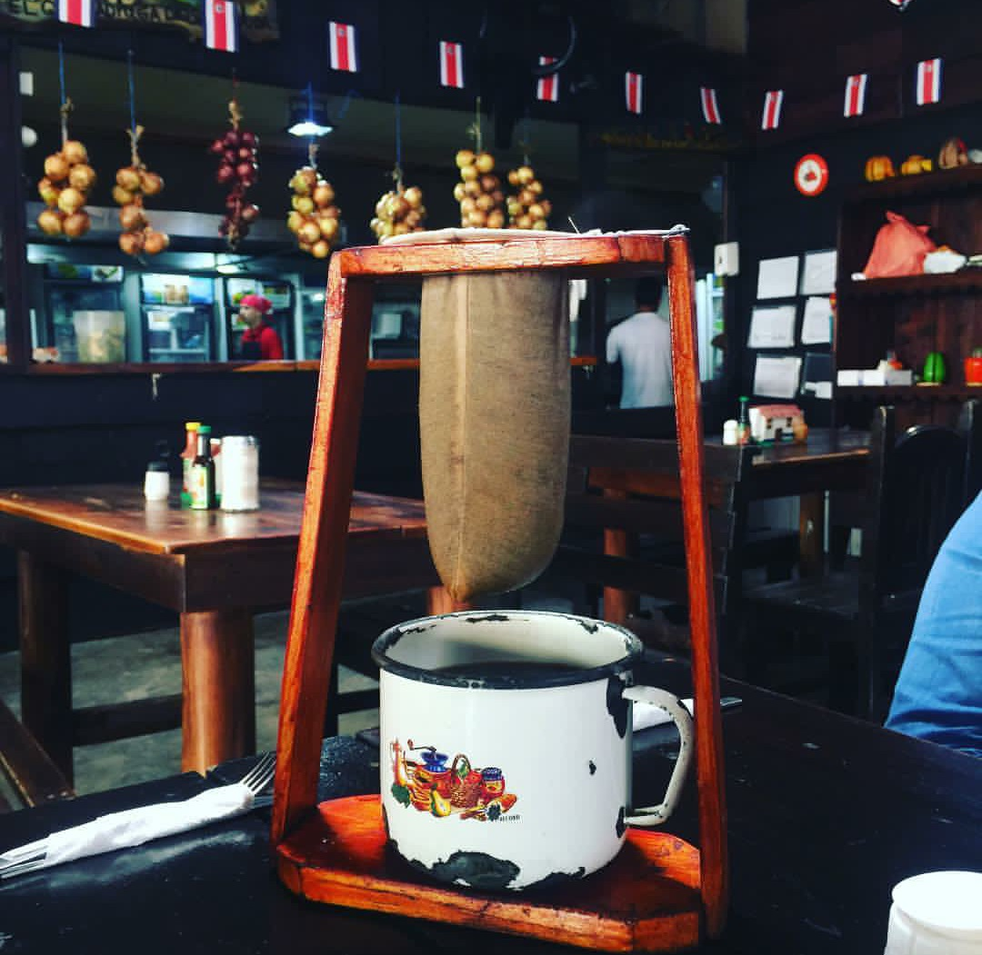 Versión jpg del archivo Archivo:Café chorreado.png